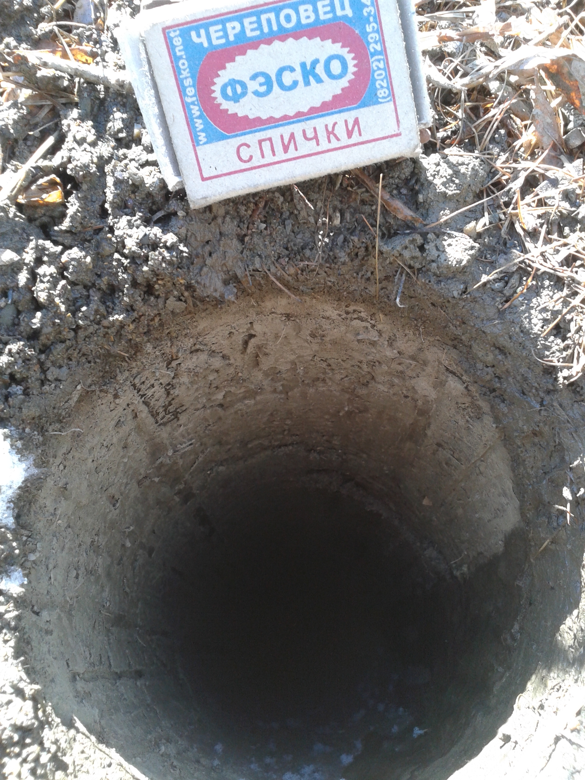 Буровая скважина в многолетнемерзлых грунтах